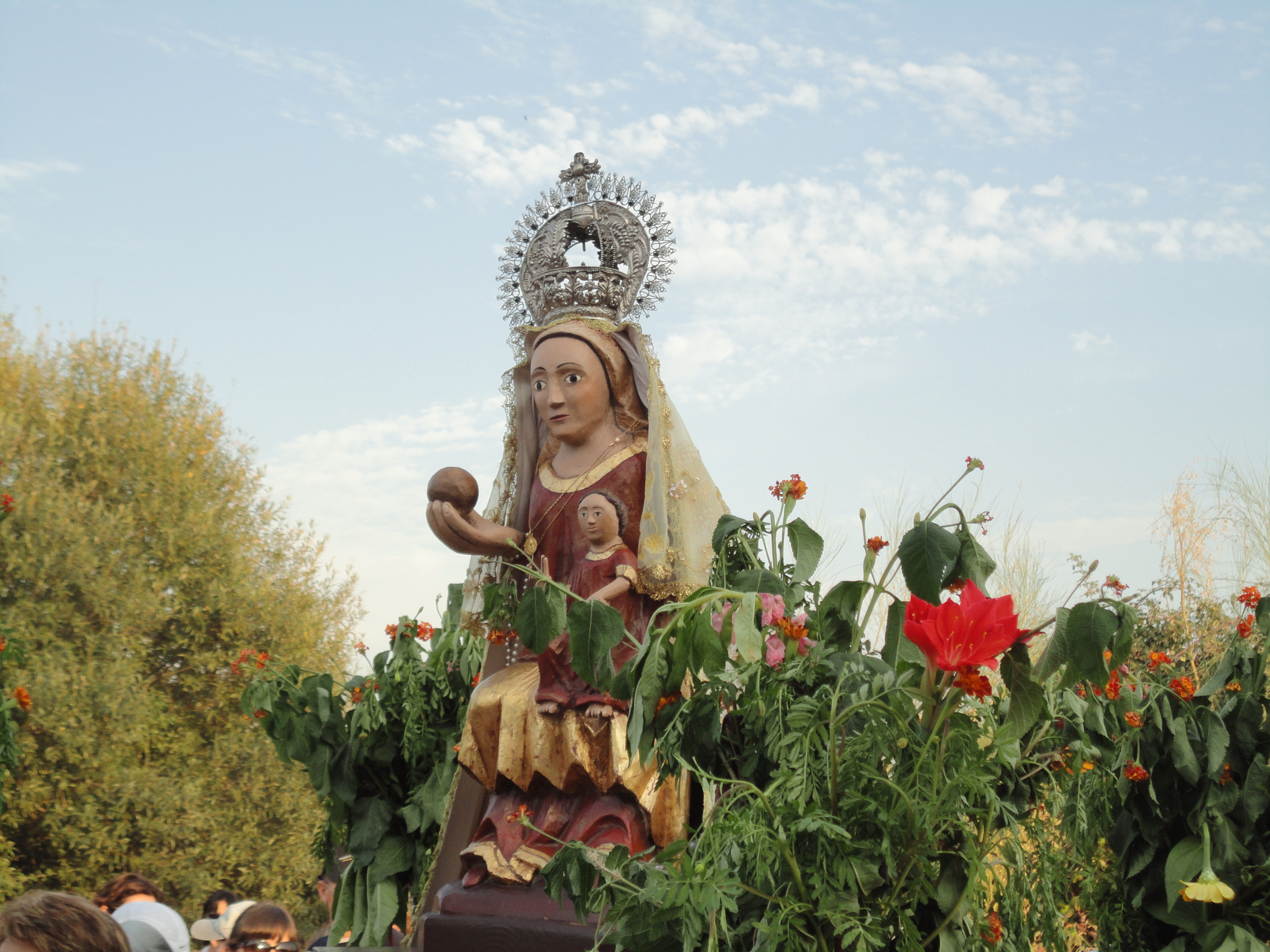 Copia de la Virgen de Valdefuentes en la procesión de subida de la virgen al pueblo de Montehermoso, en la provincia de Cáceres, España.